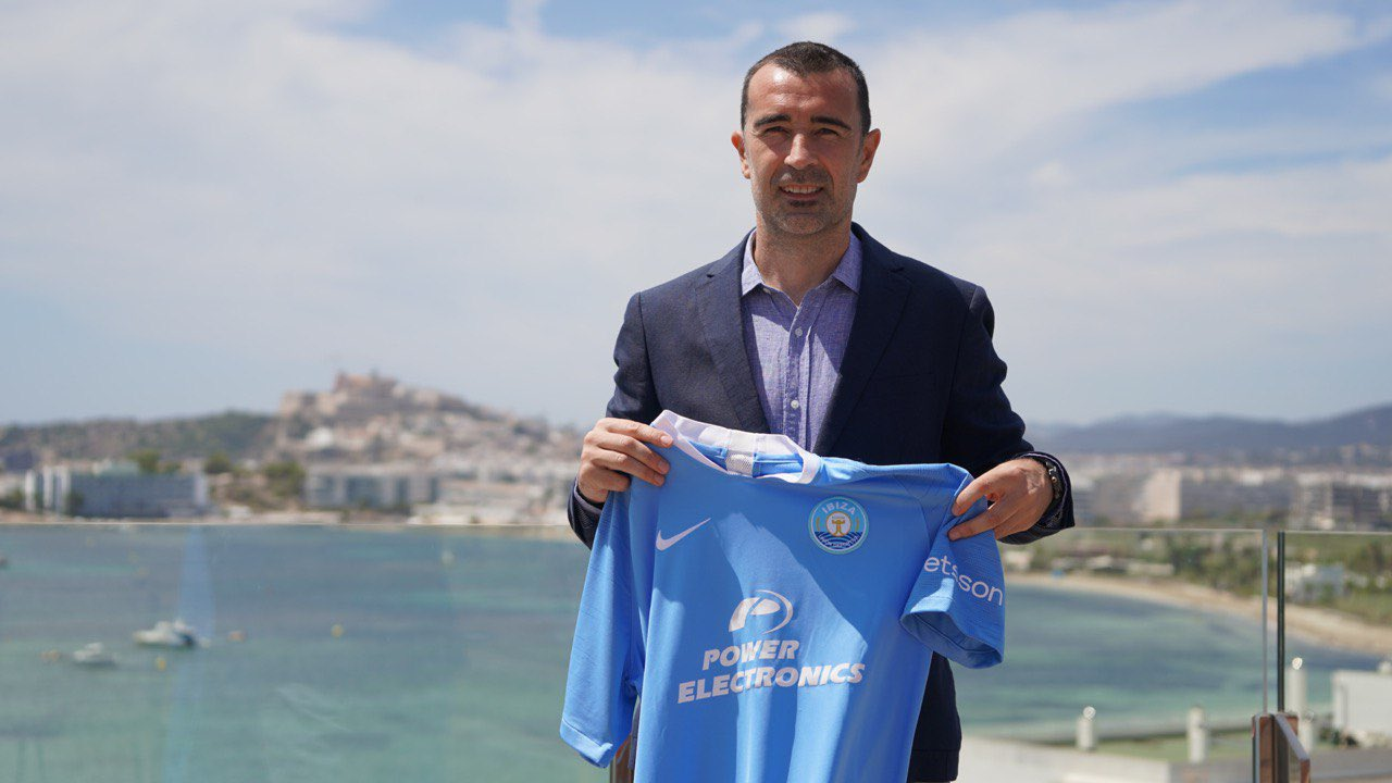 Presentación de Juan Carlos Carcedo en la UD Ibiza